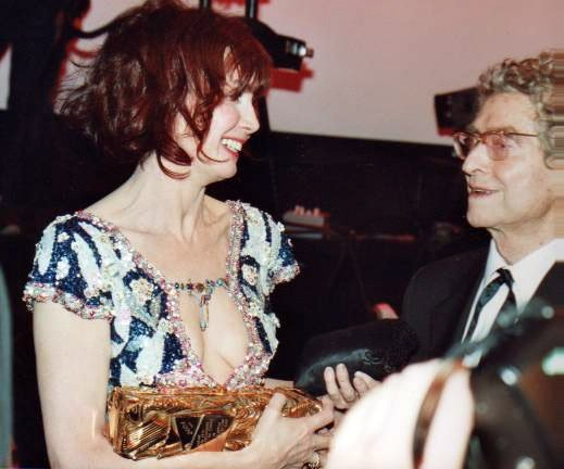 Sabine Azéma et Darry Cowl à la cérémonie des Césars.